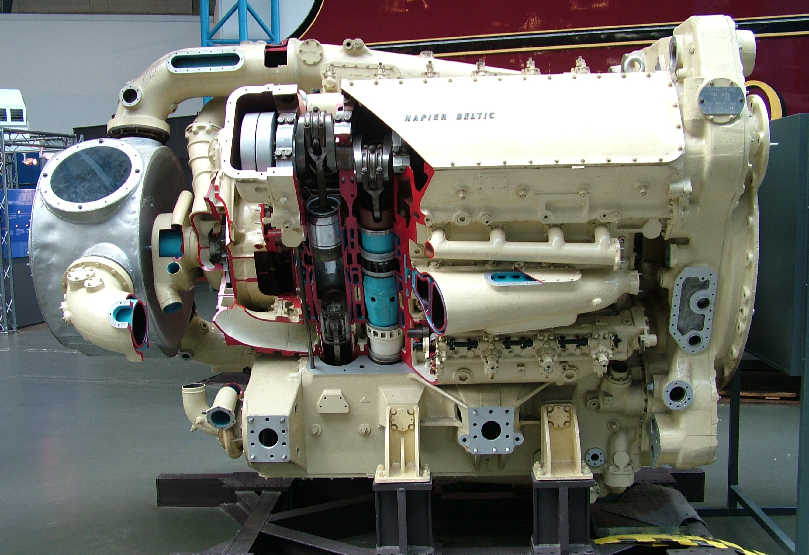 Napier Deltic Engine